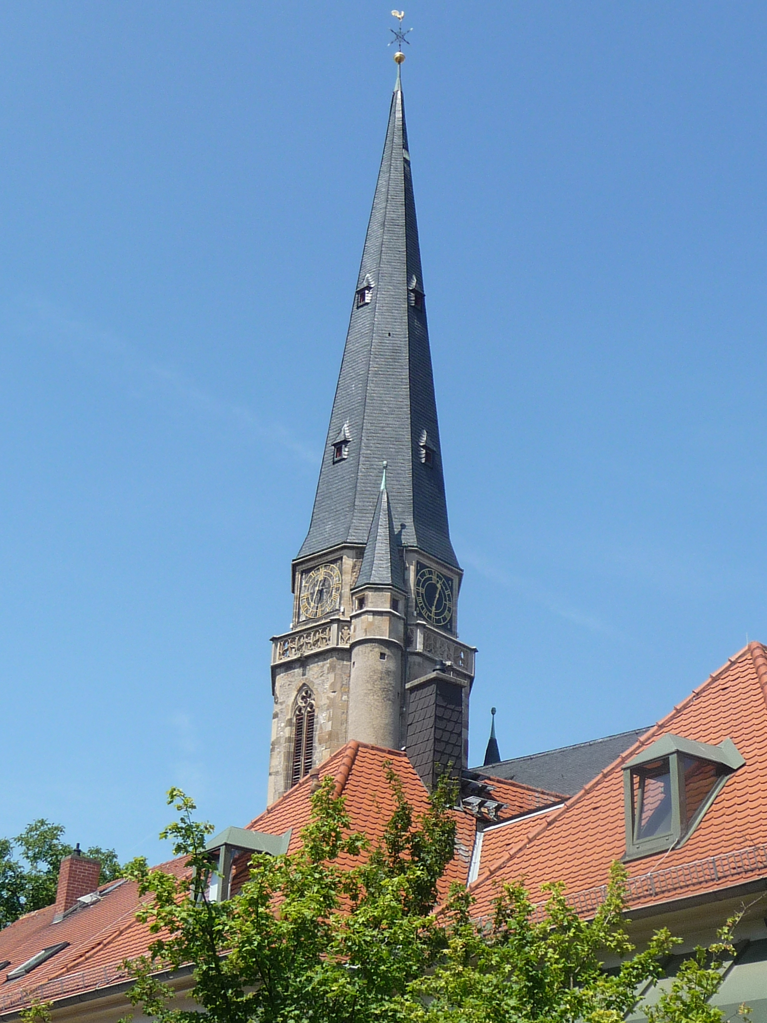 Kirchen in Alzey, Rheinland-Pfalz